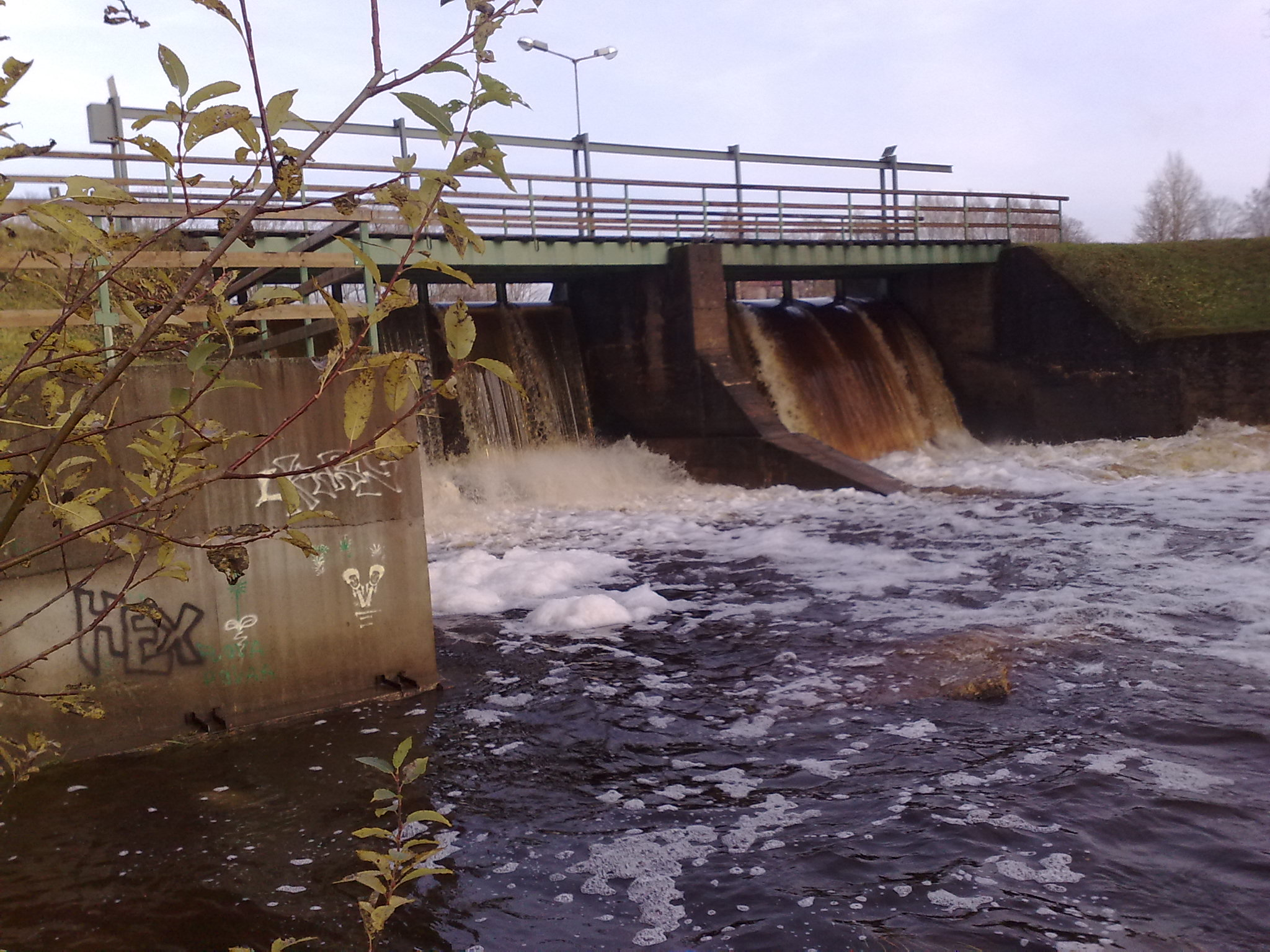 Ērgļu hidroelektrostacija